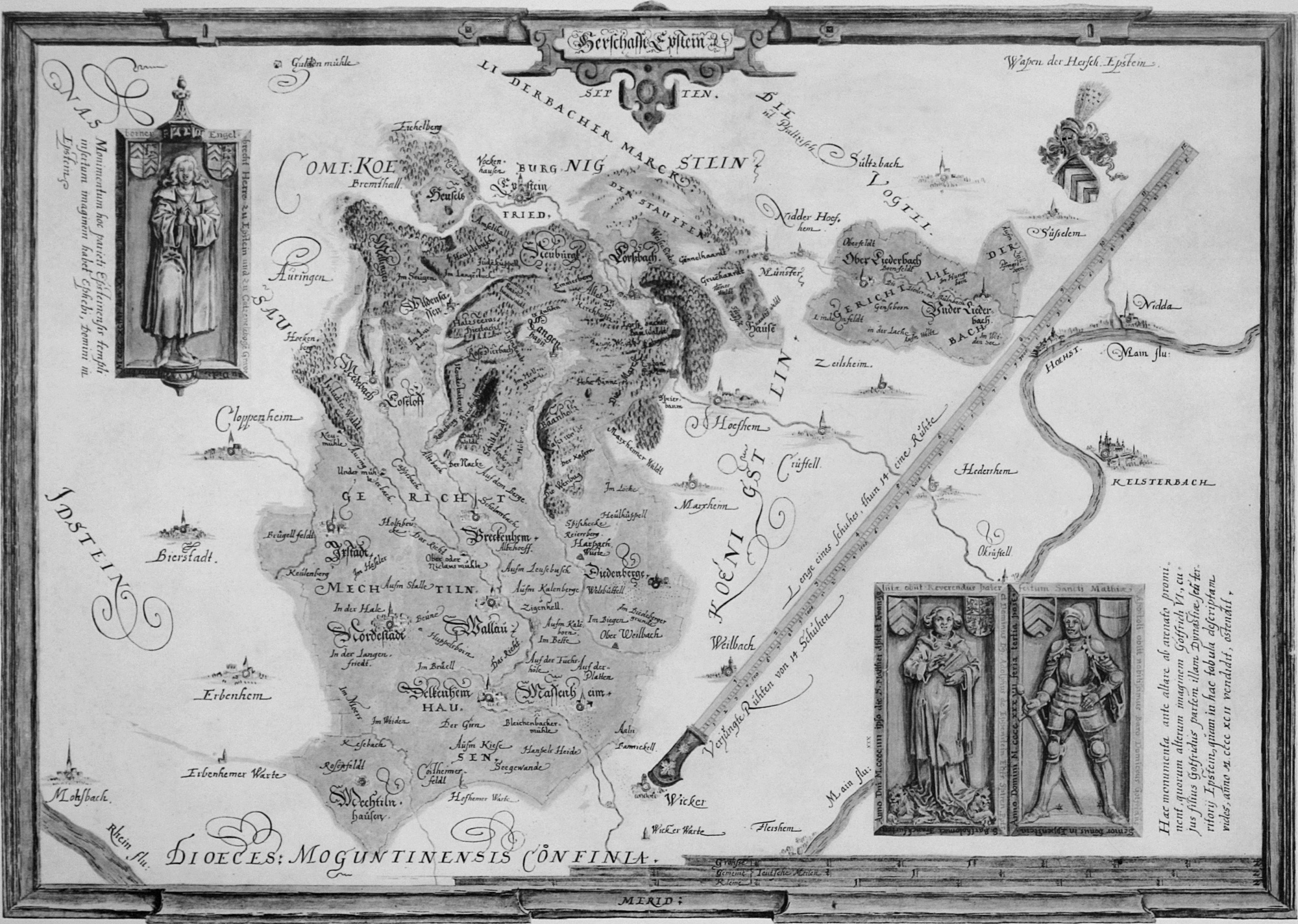 Landtafel der Herrschaft Eppstein (Generaltafel). Entstanden 1607/09. Gr. 33.8 × 48.2 cm. Titel (als Kartusche oben im Rahmen): „Herschafft Epstein“. Abbildungen: drei Grabsteine aus der Kirche in Eppstein, oben links Engelbrecht von E. († 1494), unten rechts Adolf von E., erwählter Bischof von Speyer († 1434) und Gottfried von E. († 1437). Wappen der Herren von Eppstein: drei rote Sparren in Silber, auf dem Helm umgeschlagener Hut mit Pfauenfederbusch besteckt. Farbgebung: Feld braungelb mit hellgrünlichem Rand, Wald grün mit goldenen Tupfen, außerhalb blau; Gewässer olivgrün; außerhalb der Herrschaft Eppstein alle Ortschaften auf weißem Grund; Grabsteine: oben links rot mit grauer Figur, unten rechts braun mit bläulichem Schimmer; im stahl-, zum Teil grünblauen Rahmen oben zwei gold-rote Verzierungen, unter dem gelblichen Titelschildchen ein grüner Stein in goldener Fassung. Maßstab 1 : 63000.